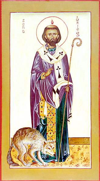 L'icône de St. Brieuc peinte pour l'Association orthodoxe sainte Anne (Bretagne).